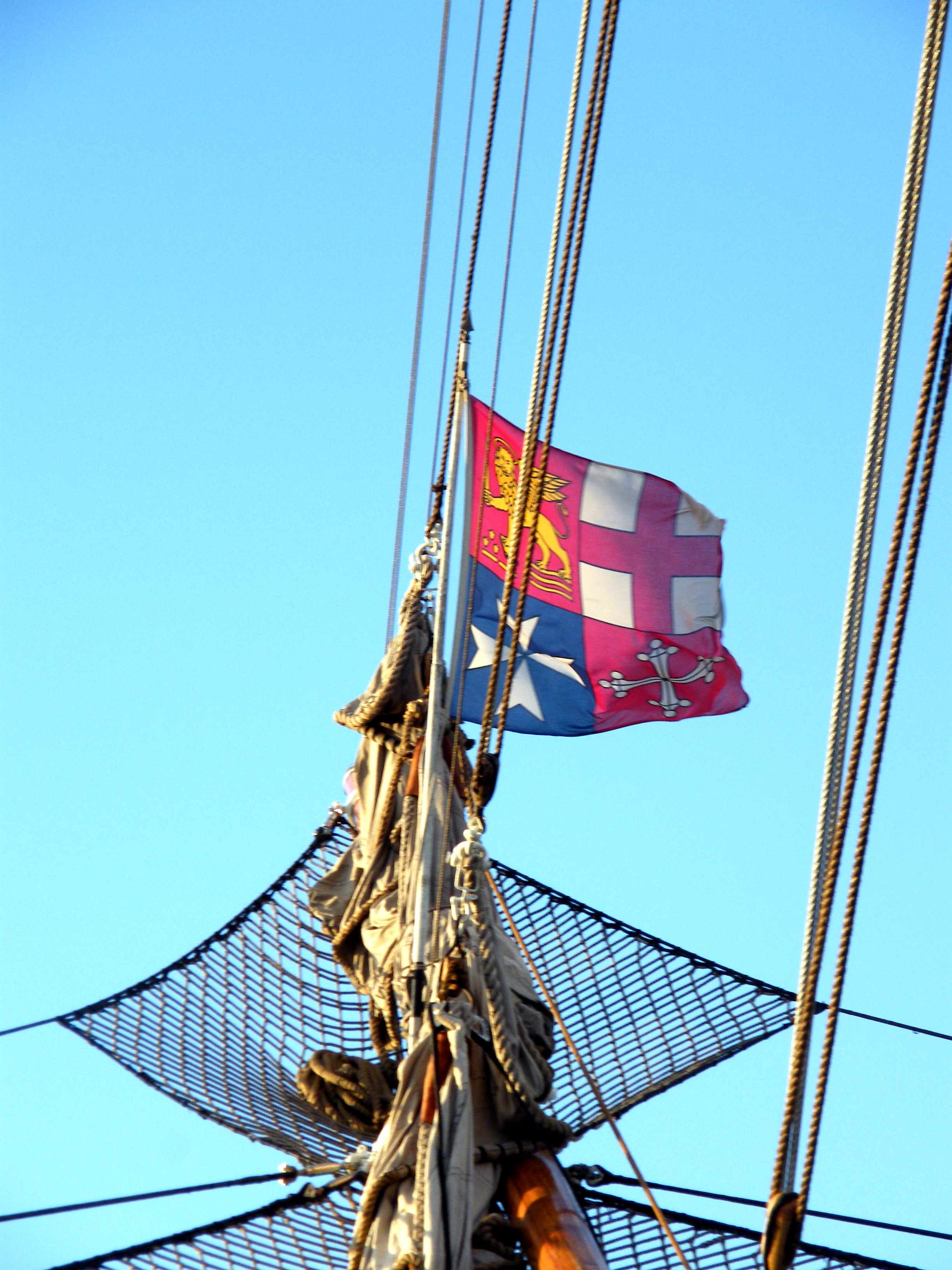 Bandiera di bompresso del Vespucci